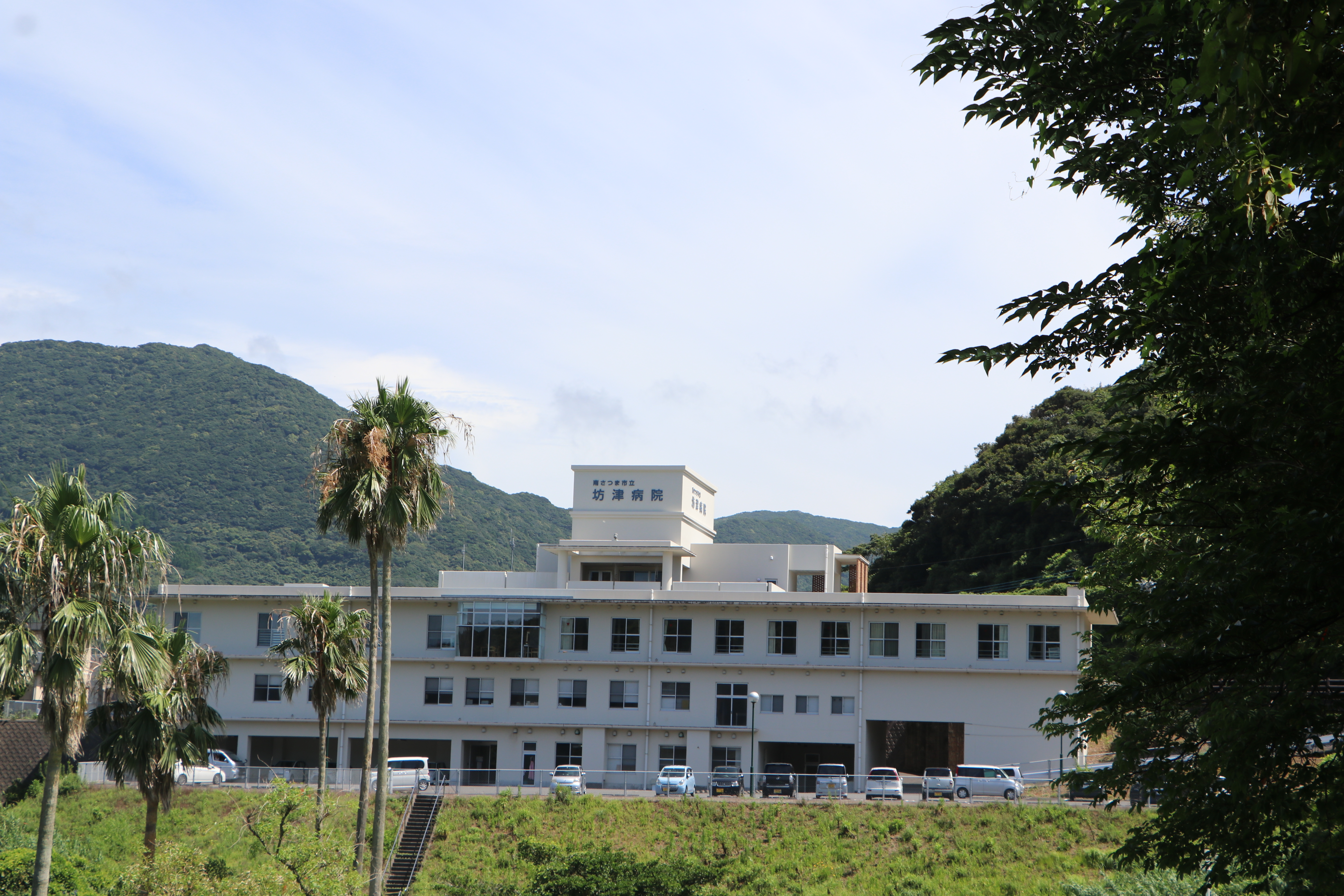 南さつま市立坊津病院の外観